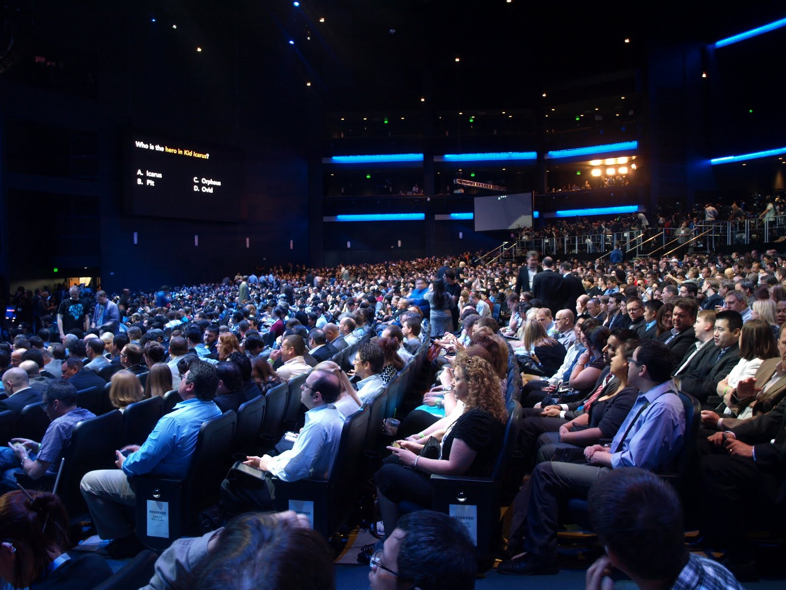 Público previo a la conferencia de Nintendo en el Nokia Theatre en el marco del E3 2011 de Los Angeles (EEUU).